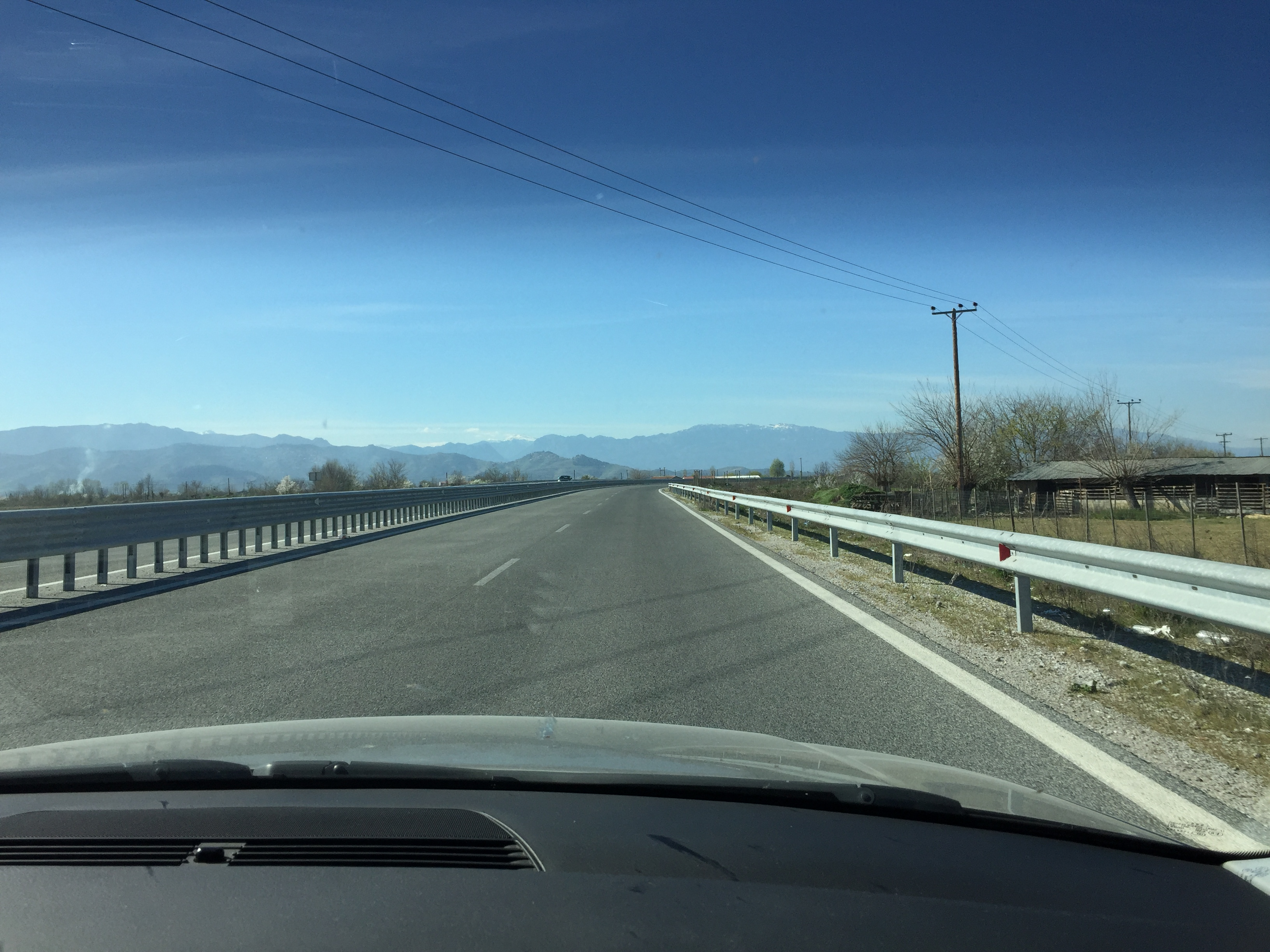 Άποψη της παράκαμψης του Αρτεσιανού της Εθνικής Οδού 30